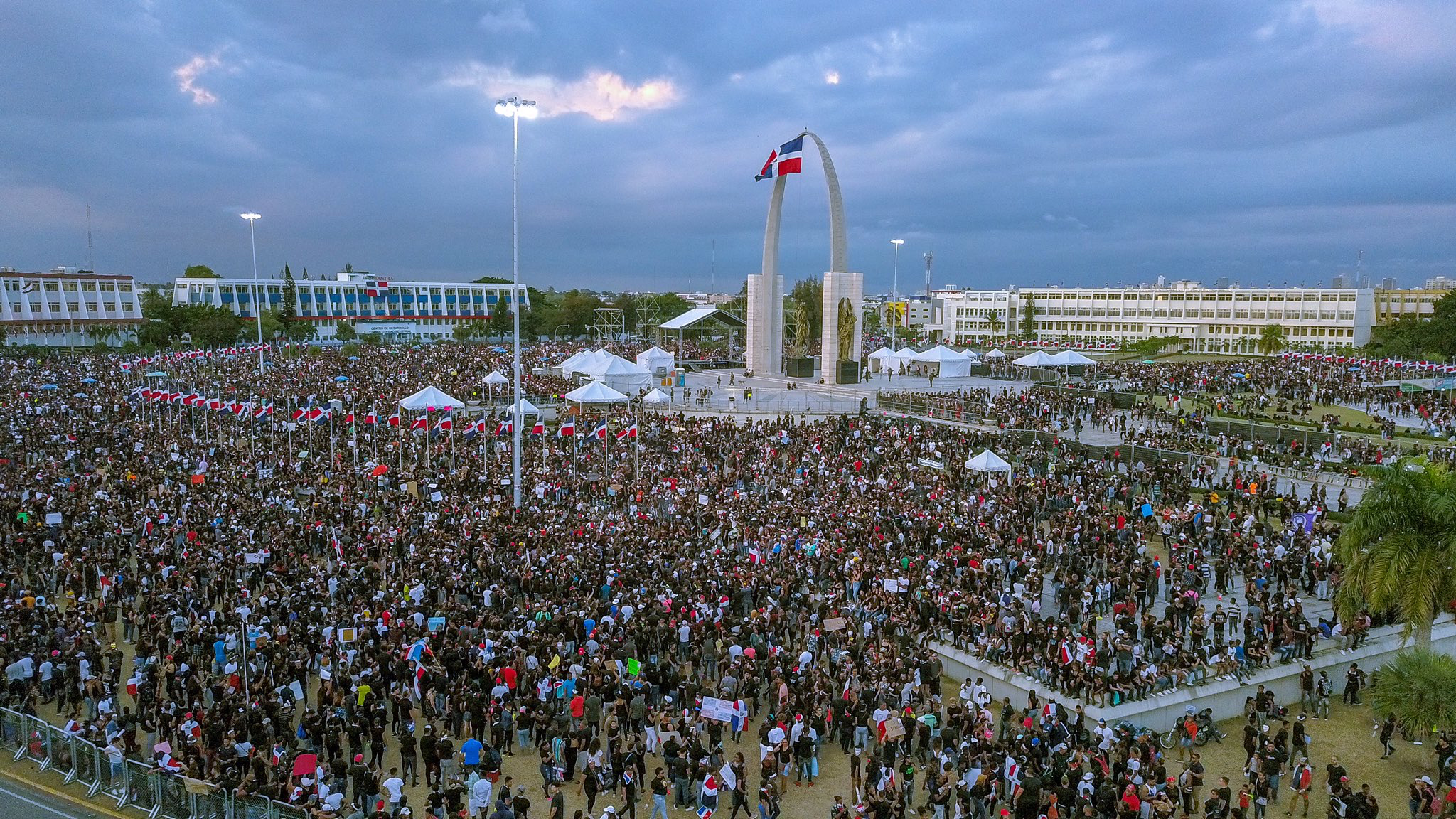 Protestas dominicanas en Santo Domingo por elecciones suspendidas en República Dominicana.